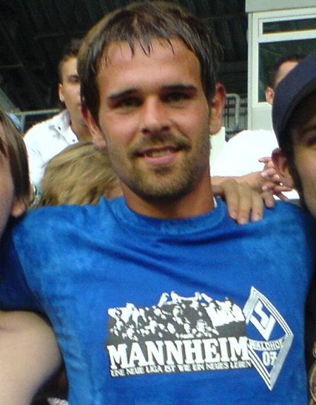 Daniel Reule